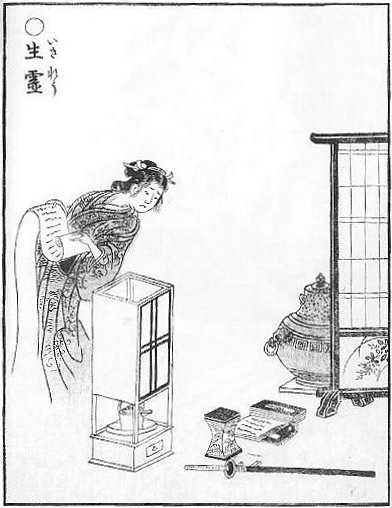 Ikiryō(生霊) from the Gazu Hyakki Yakō (画図百鬼夜行)